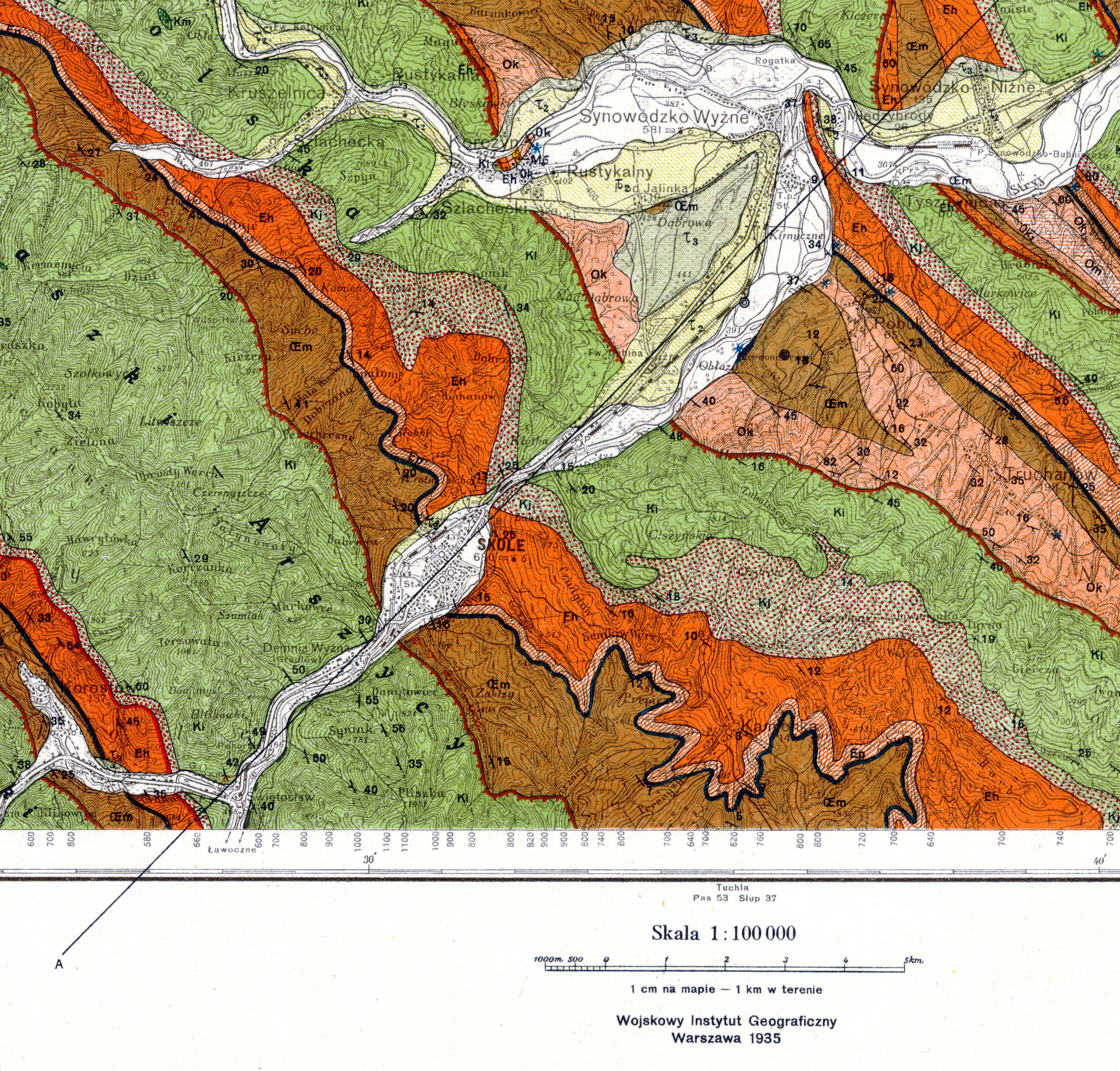 Фрагмент геологічної карти листа Сколе